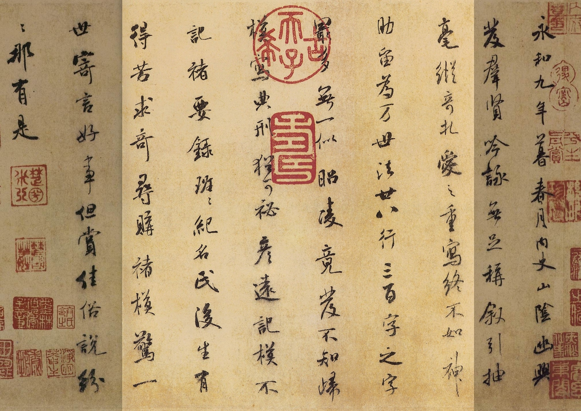 蘭亭集序米芾詩題本米芾詩題